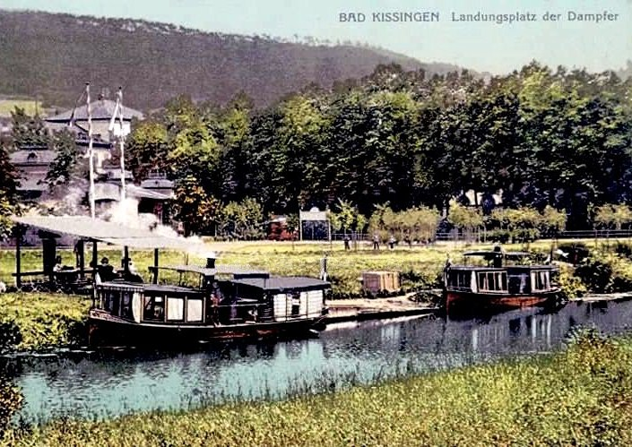 Die beiden "Dampferle" am Halteplatz in der Fränkischen Saale in Bad Kissingen (1907)